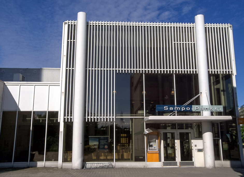 Sampo Pankin Tapiolan konttori.